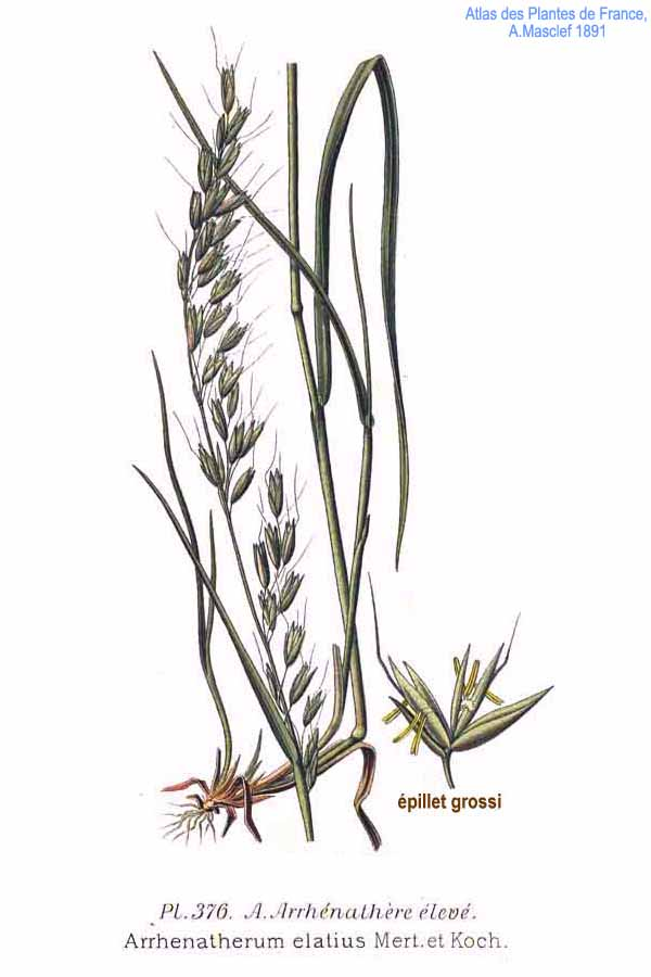 Arrhenatherum elatius Mert. et Koch.